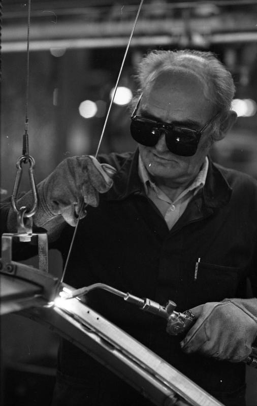 Juni 1988 Stuttgart-Untertürkheim, Daimler-Benz-Werk